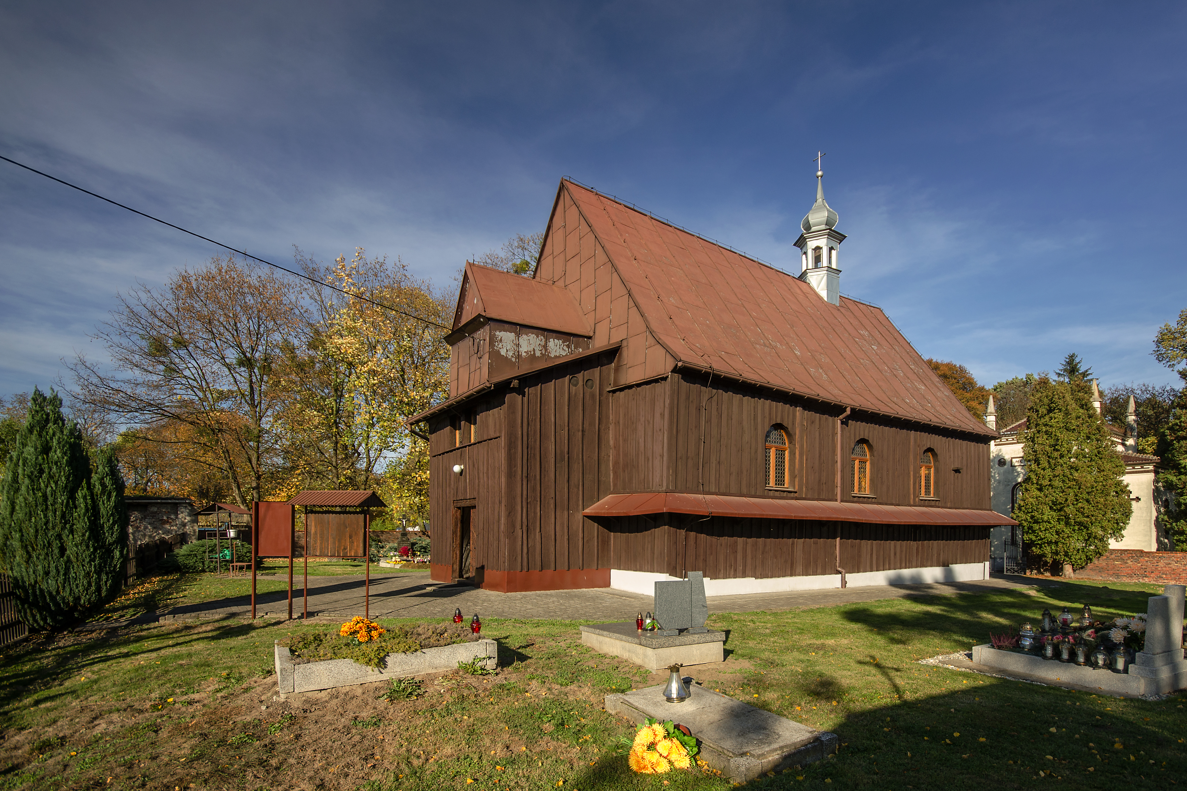 Miejsce Odrzańskie, kościół pw. Św. Trójcy, 1770